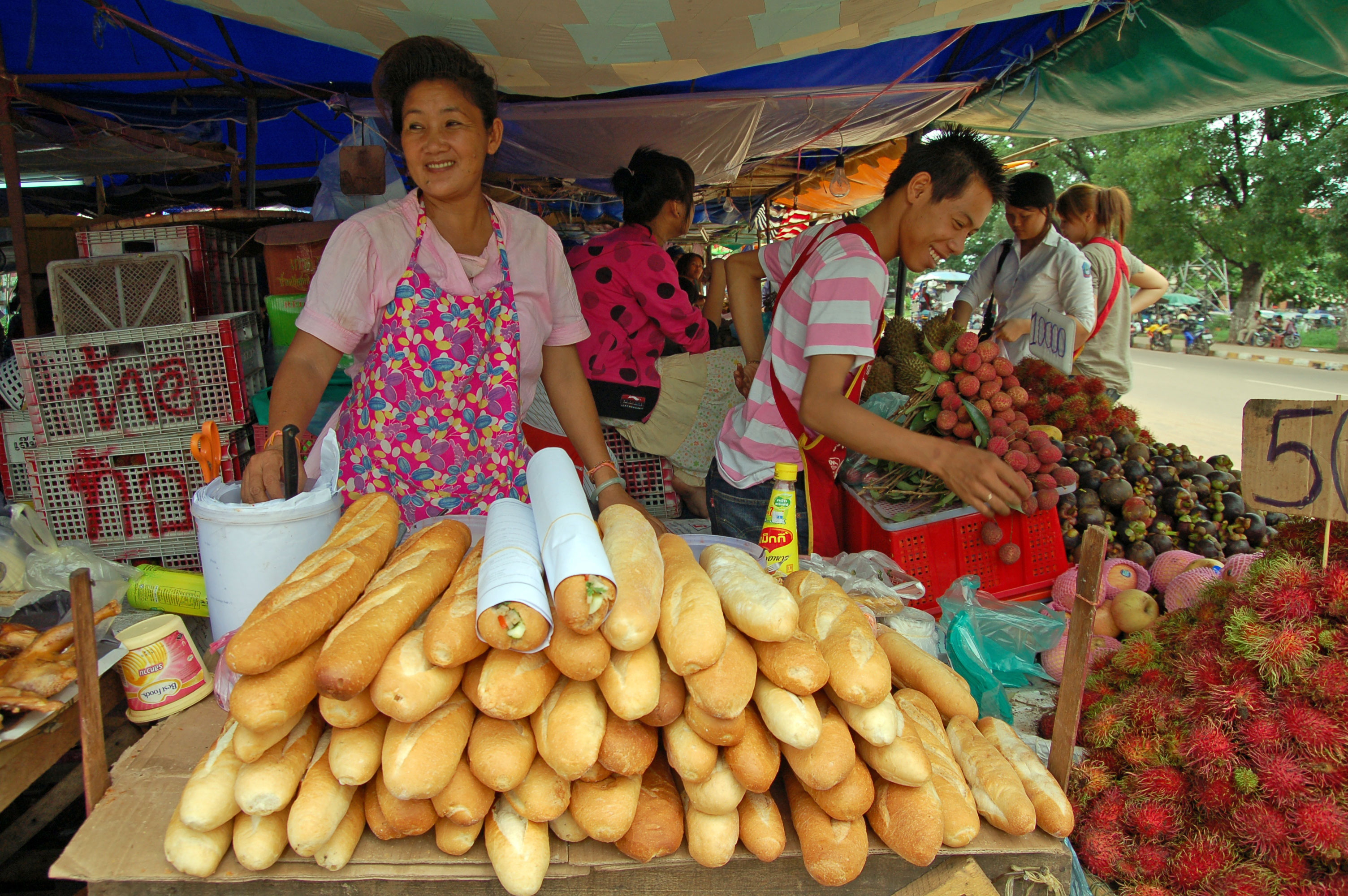 Food vendors in Laos